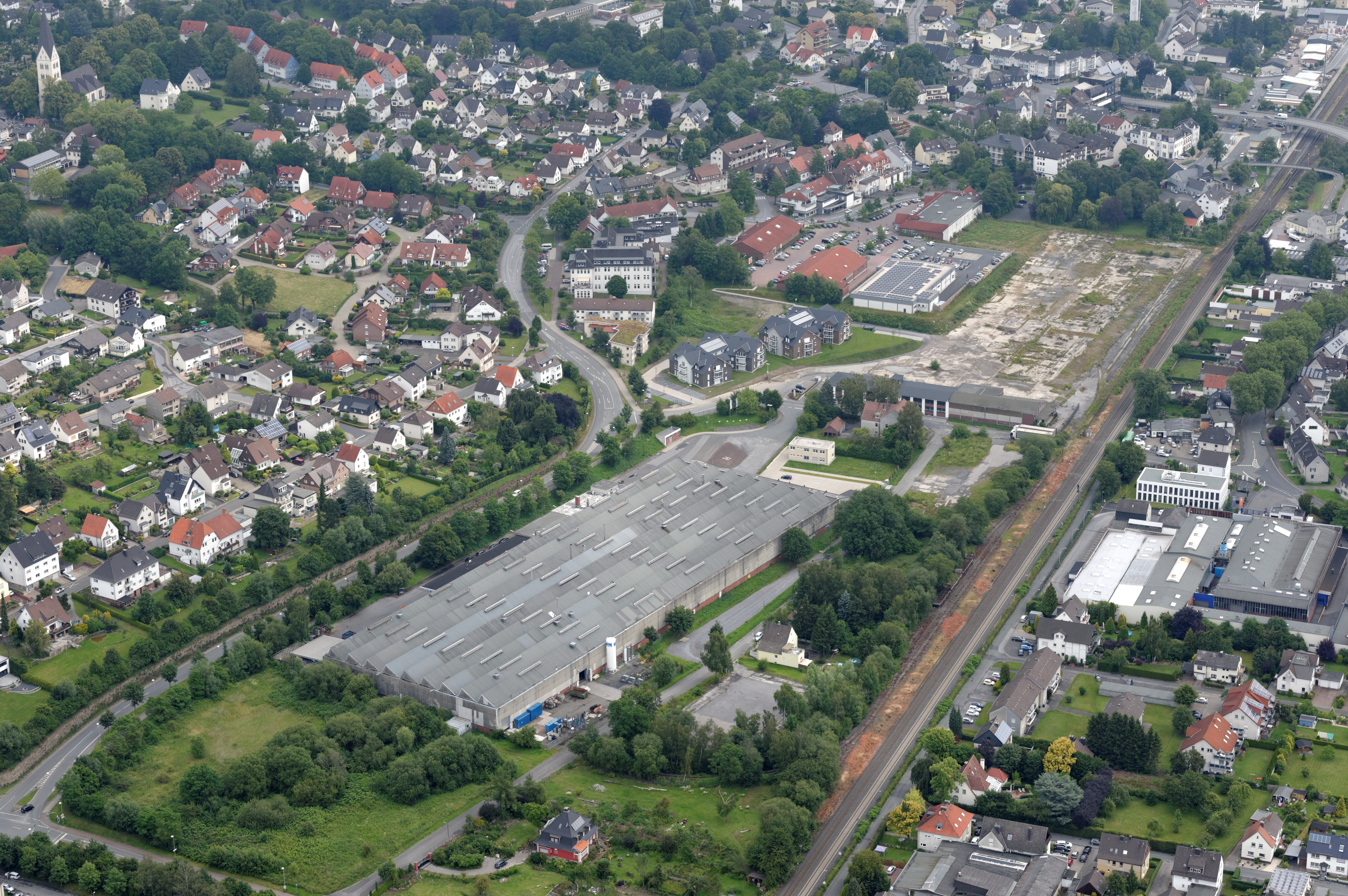 Fotoflug Sauerland Nord. Wickede (Ruhr), Ortszentrum und Werk Wickede der Salzgitter Mannesmann Präzisrohr an der Bahnstrecke Schwerte–Warburg, ehemaliges Mannesmann-Gelände, Blickrichtung Nordost The making of this document was supported by the Community-Budget of Wikimedia Germany.